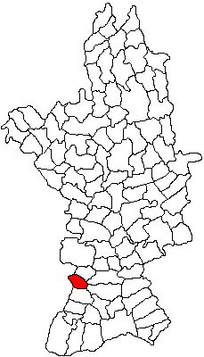 Categorie:Hărţi ale judeţului Olt